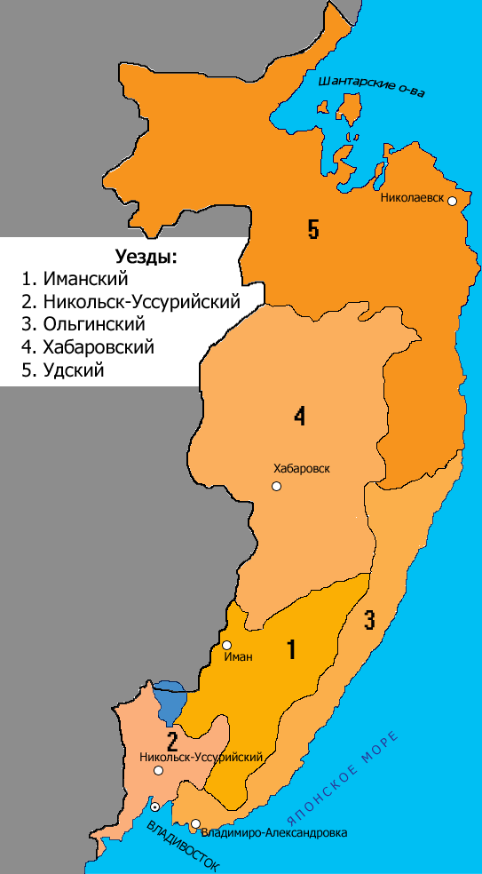 Карта территории Приморской области Российской империи (по атласу 1912 года)